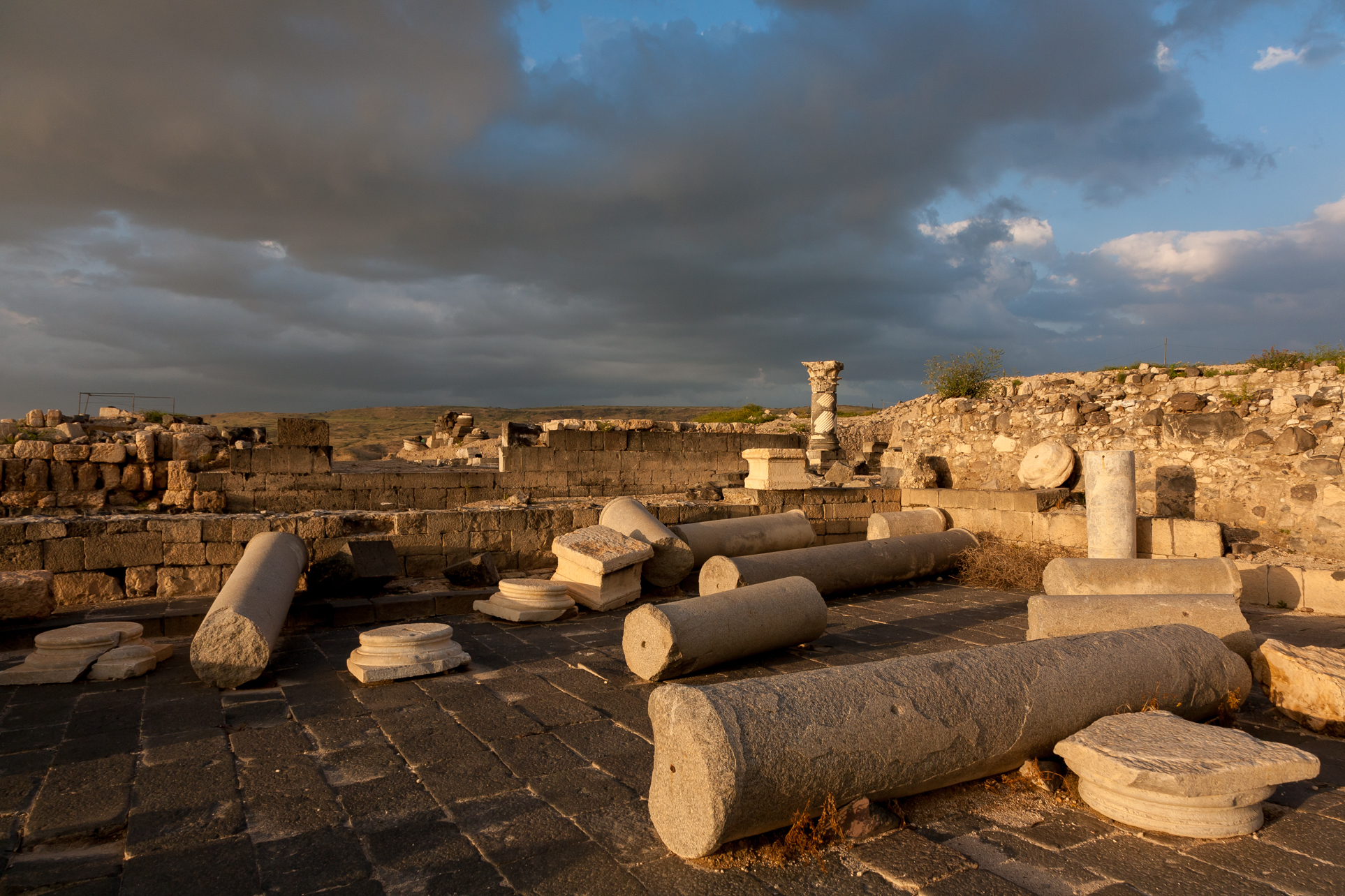 סוסיתא נוסדה כעיר מדינה (פוליס) ככל הנראה באמצע המאה ה-2 לפנה"ס בידי הממלכה הסלאוקית.